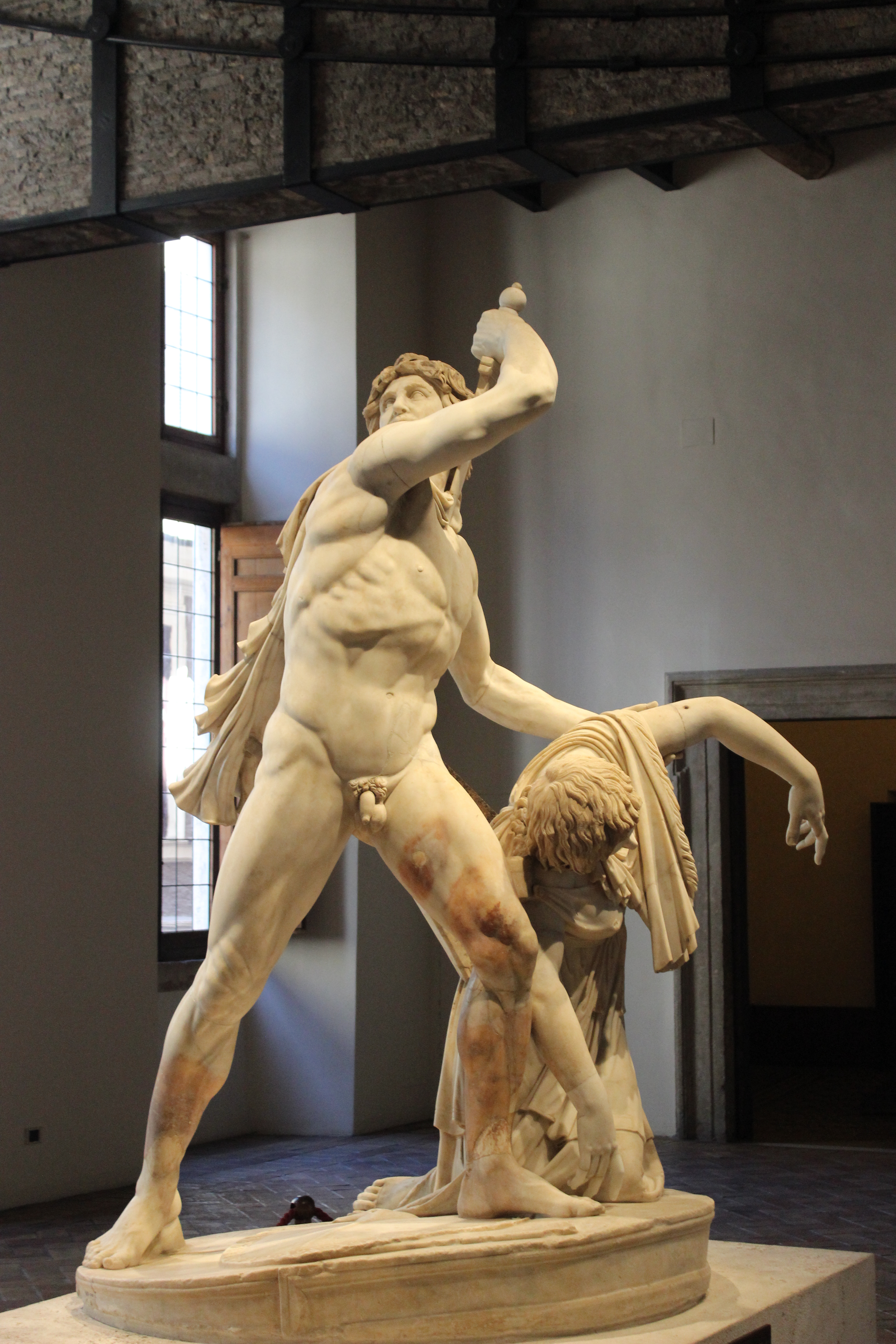 Roma. Palazzo Altemps. Gálata suicida.